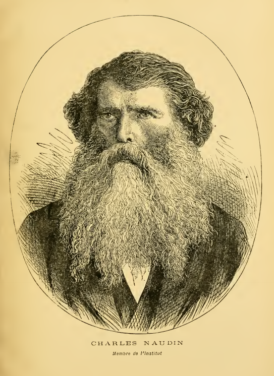 Ein Portrait des französischen Botanikers Charles Victor Naudin aus dem Einband seines Buches "Manuel de l'acclimateur, ou, Choix de plantes recommandées pour l'agriculture, l'industrie et la médecine" (1887). Online unter